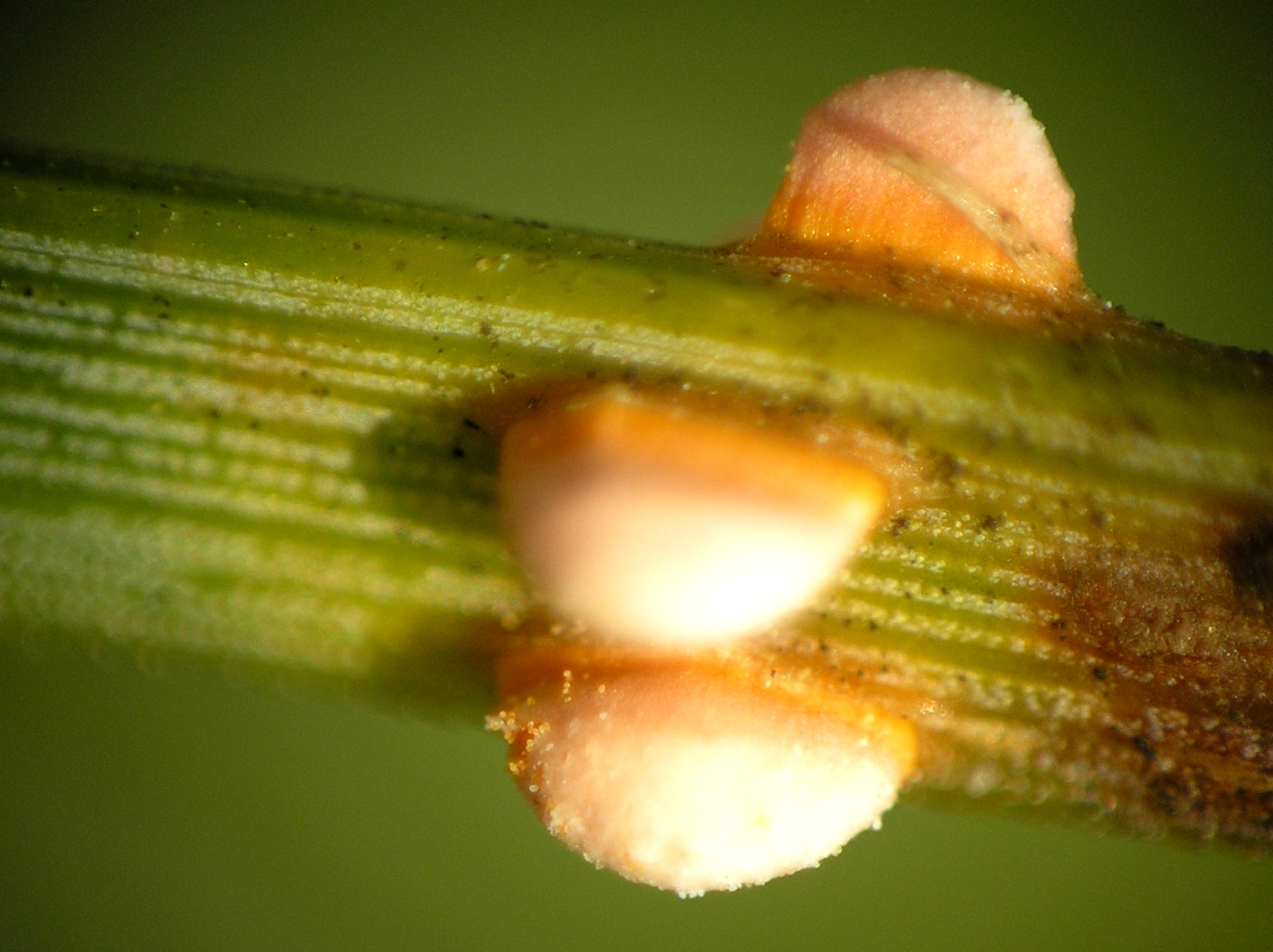 Coleosporium tussilaginis on Pinus sylvestris, Białowieża, Polska